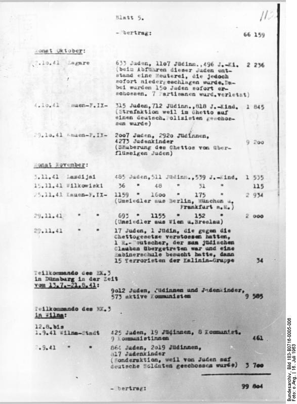 Oberstes Gericht, Globke-Prozess, Beweisstück Zentralbild 16.7.1963 Dokumente über faschistische Greuel aus der UdSSR. UBz: Reproduktion der auszugsweise während des 7. Verhandlungstages des Globke-Prozesses am 15. Juli verlesenen Dokumente über faschistische Greuel in der Sowjetunion. Pedantisch genau zieht hier ein SS-Standartenführer Jäger die grausige Bilanz: "In Litauen gibt es keine Juden mehr." (siehe auch 2 - 5 u. 7 - 10N)